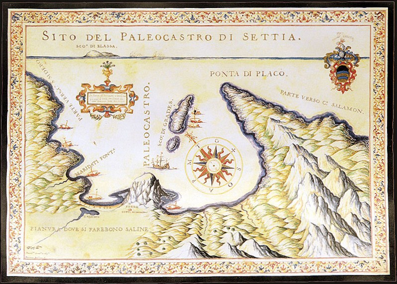 Historische Karte der Bucht von Palekastro (Paleocastro) an der Ostküste von Kreta, Griechenland